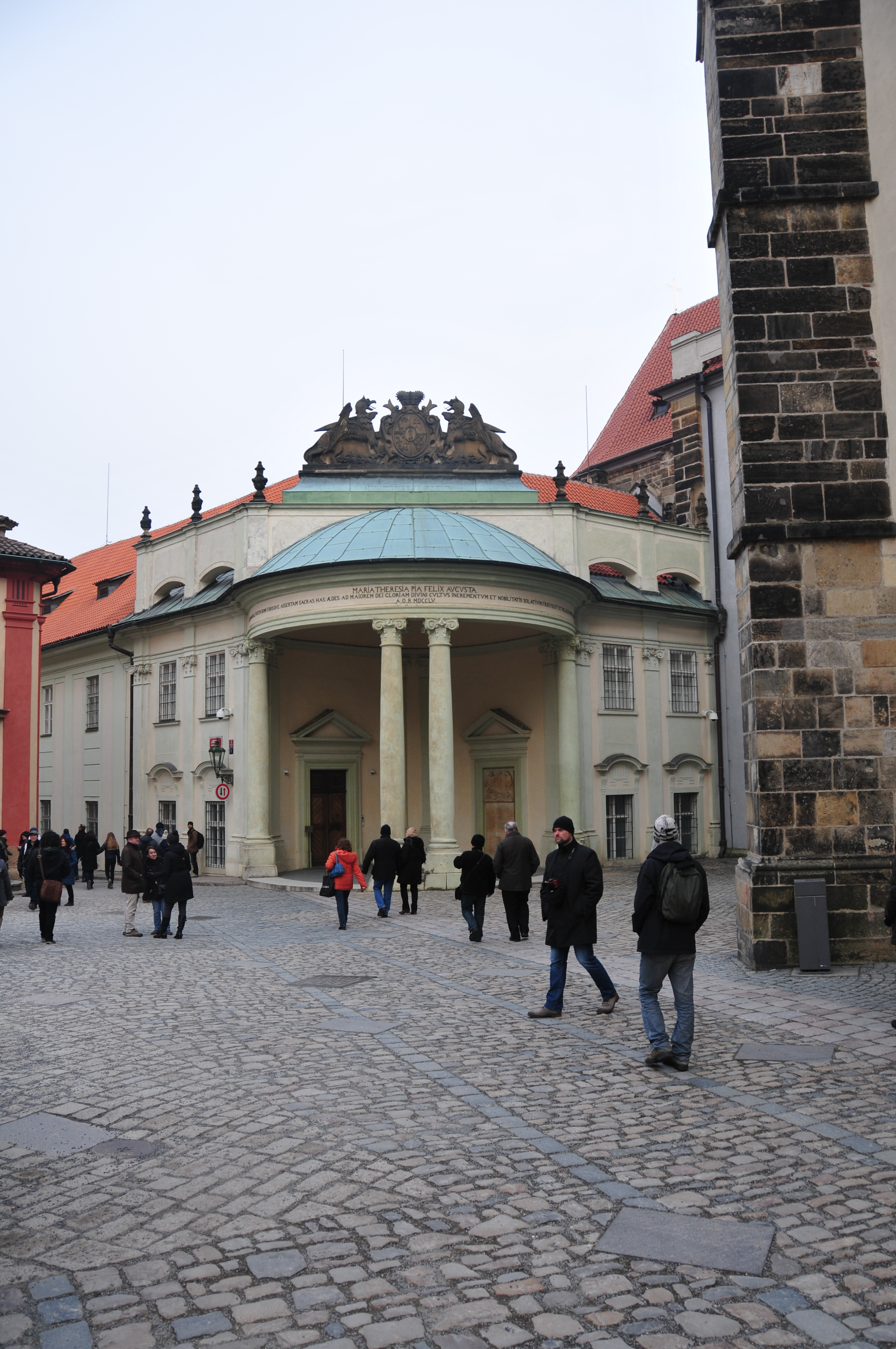 Prag